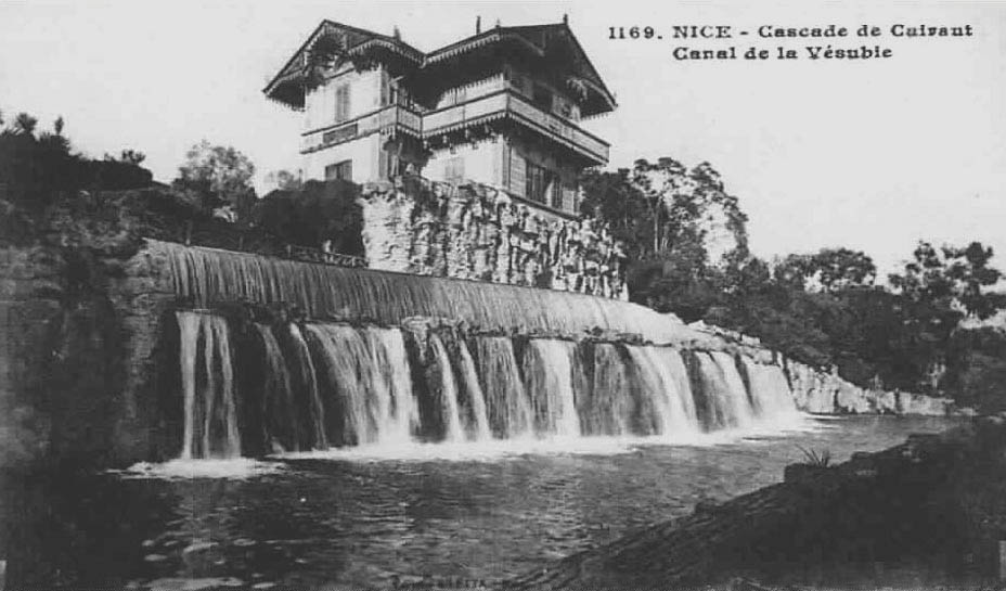 La cascade de Gairaut sur la colline de Rimiez à Nice. Carte postale, noir et blanc au format 14X9. Provenance : Inconnue.